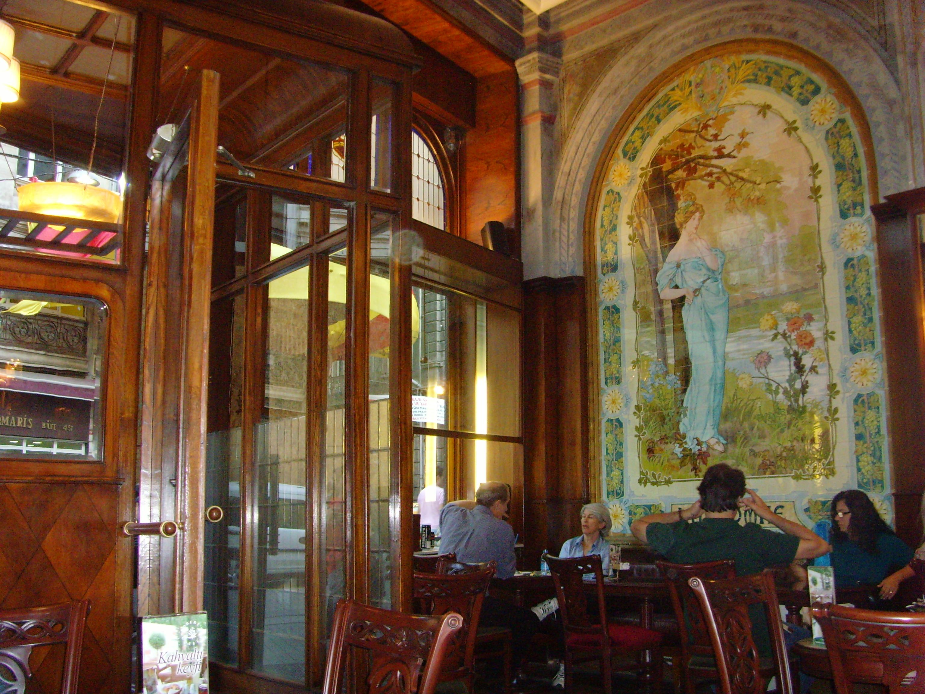 İstiklal Caddesi'ndeki Markiz Pastanesi'nin içi / Interior of Cafe Merkiz on İstiklal Avenue